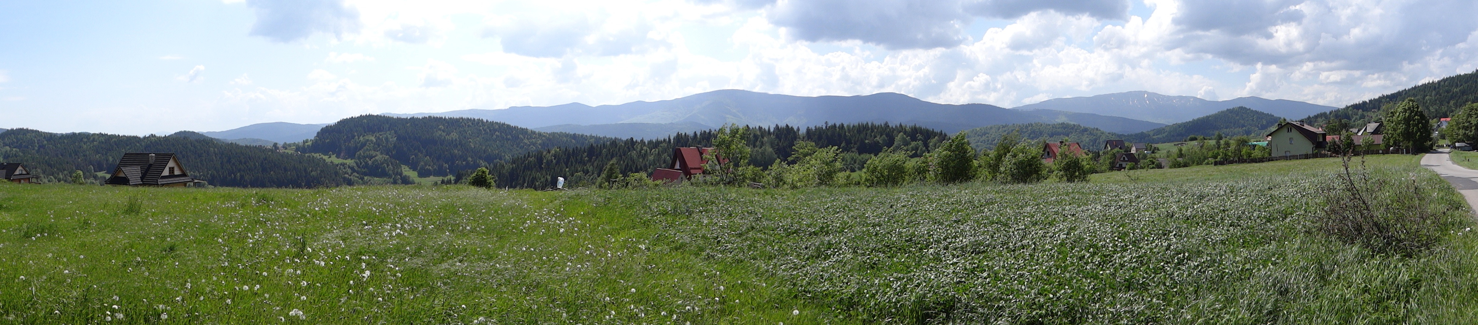 Panorama Pasma Babiogórskiego z okolicy przełęczy Przysłop pod Magurką w Paśmie Jałowieckim